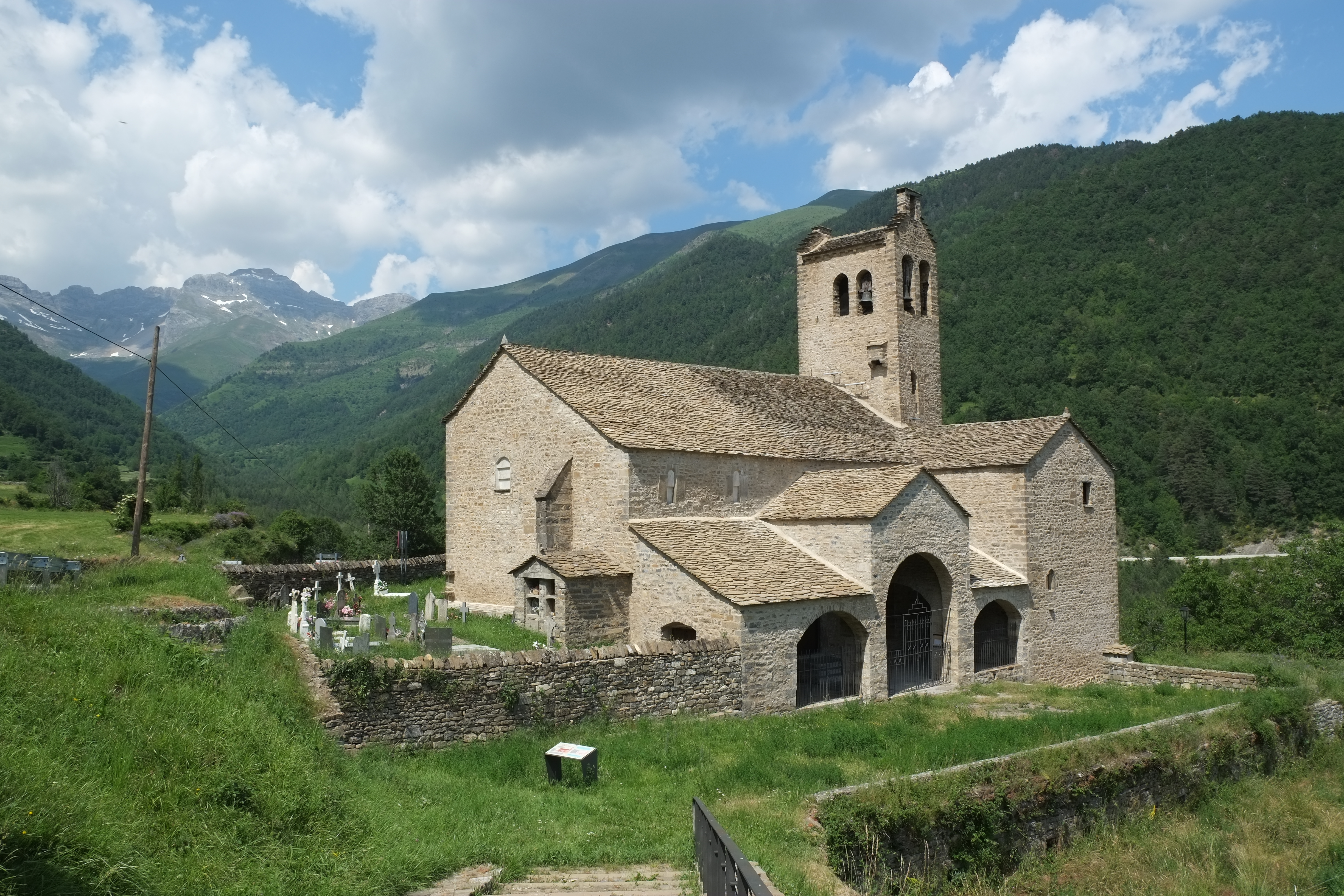 Kirche San Miguel in Linás de Broto in Aragonien (Spanien).